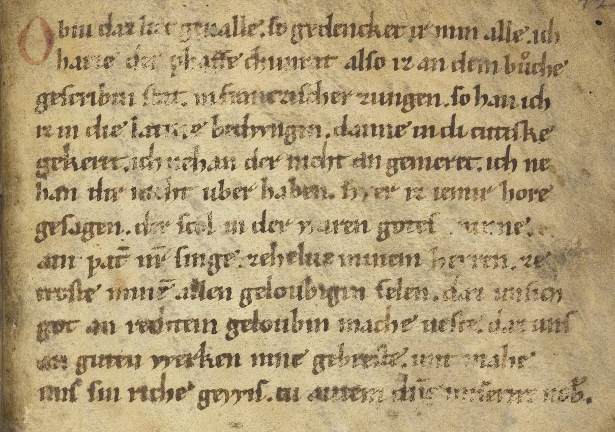 Rolandslied des Pfaffen Konrad. Übersetzung bzw. Bearbeitung der altfranzösischen Chanson de Roland (um 1100). Blatt 123r, Detail